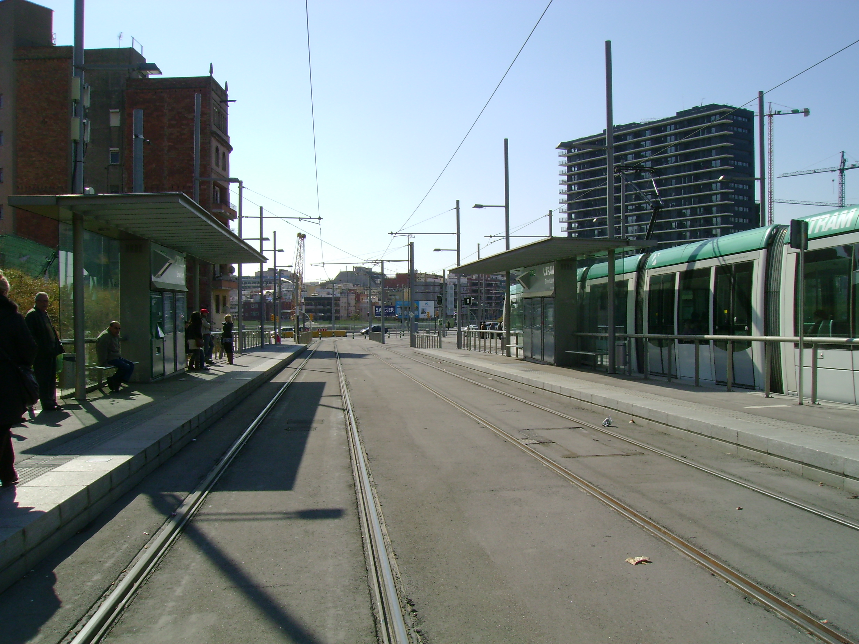 Foto capturada per la meva càmara a l'estació d'Ernest Lluch (Trambaix).